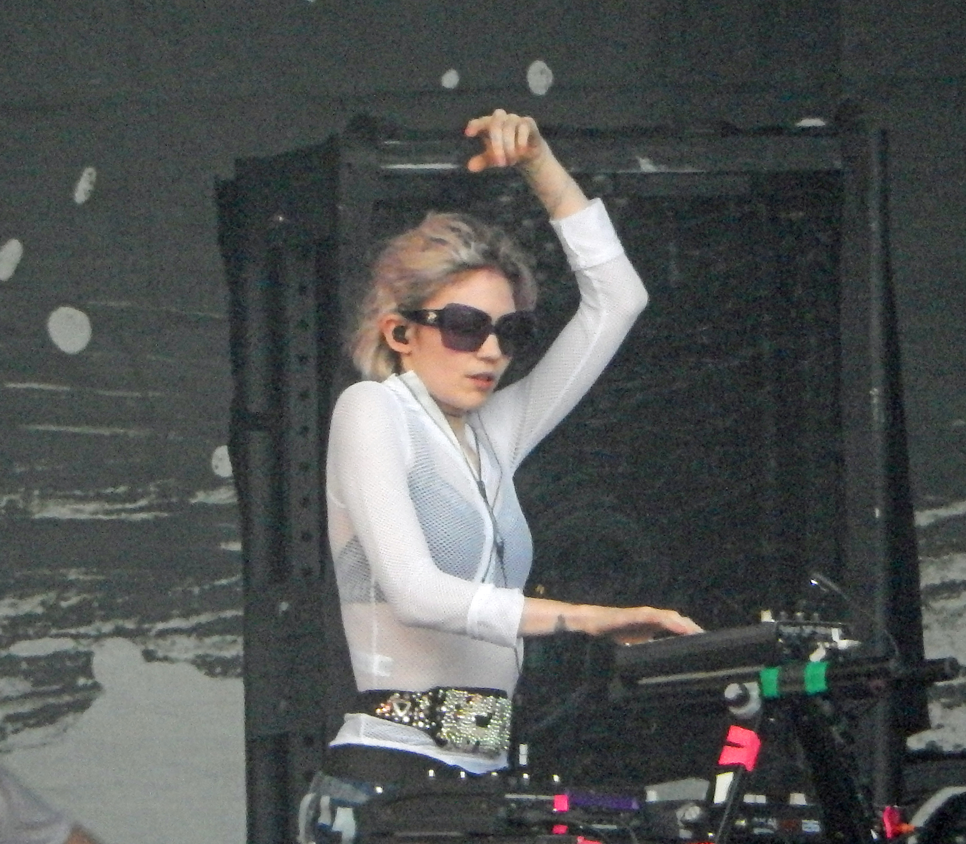 Grimes, Lollapalooza 2016, Chicago